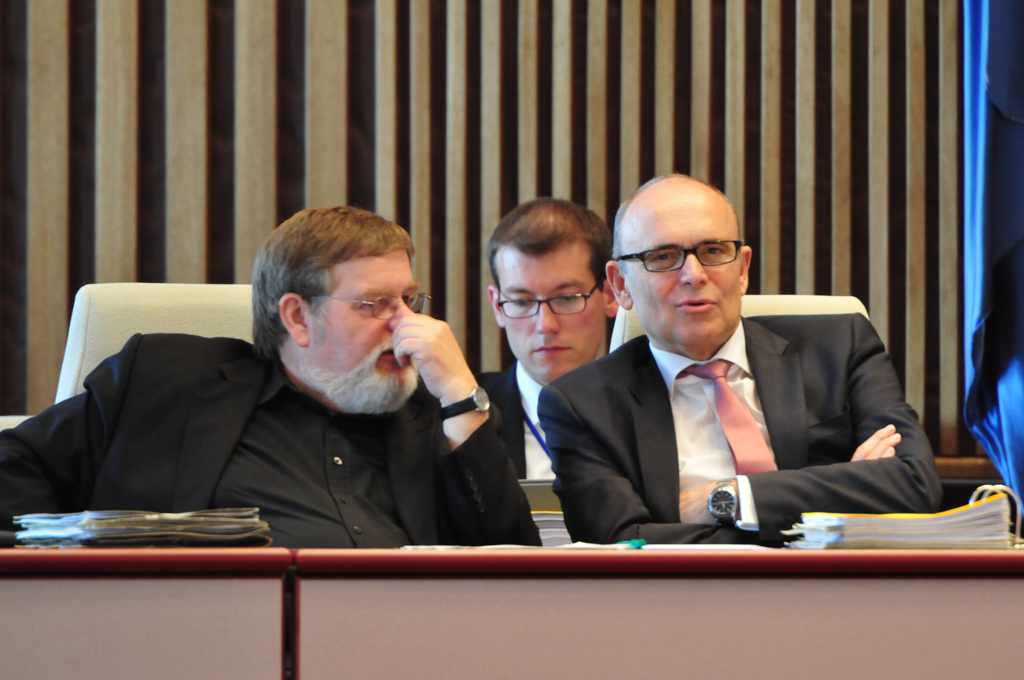 Landtagssitzung des Landtages von Mecklenburg-Vorpommern in Schwerin am 19. Juni 2013.